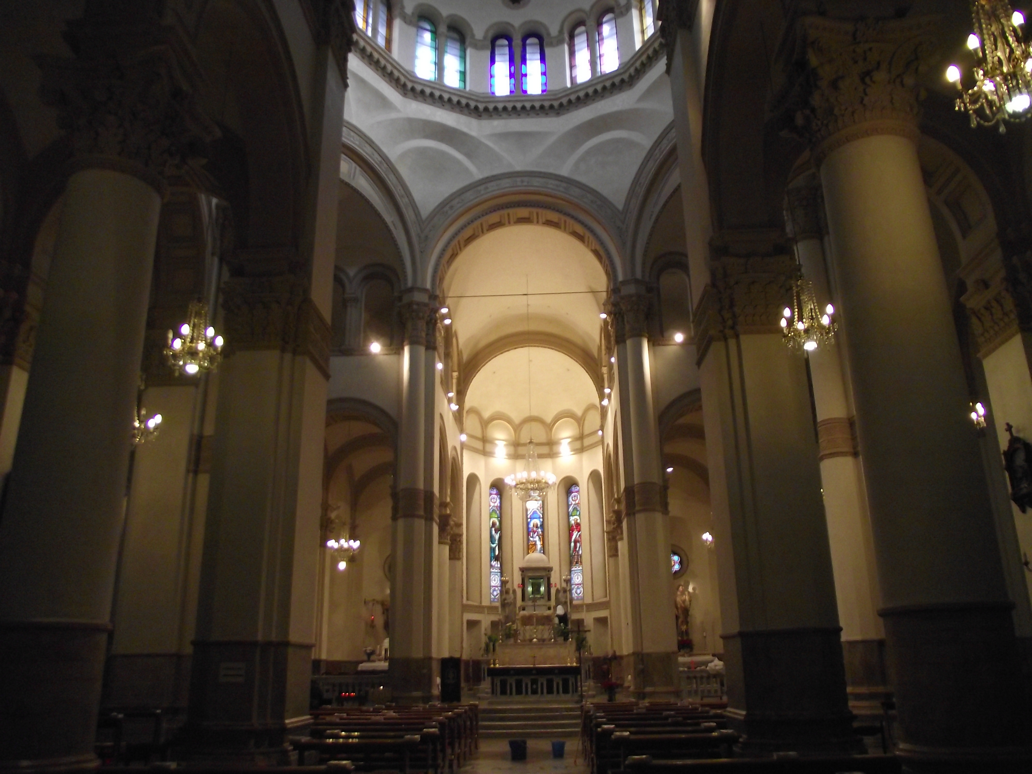 Osimo, Santuario di Campocavallo, XIX secolo